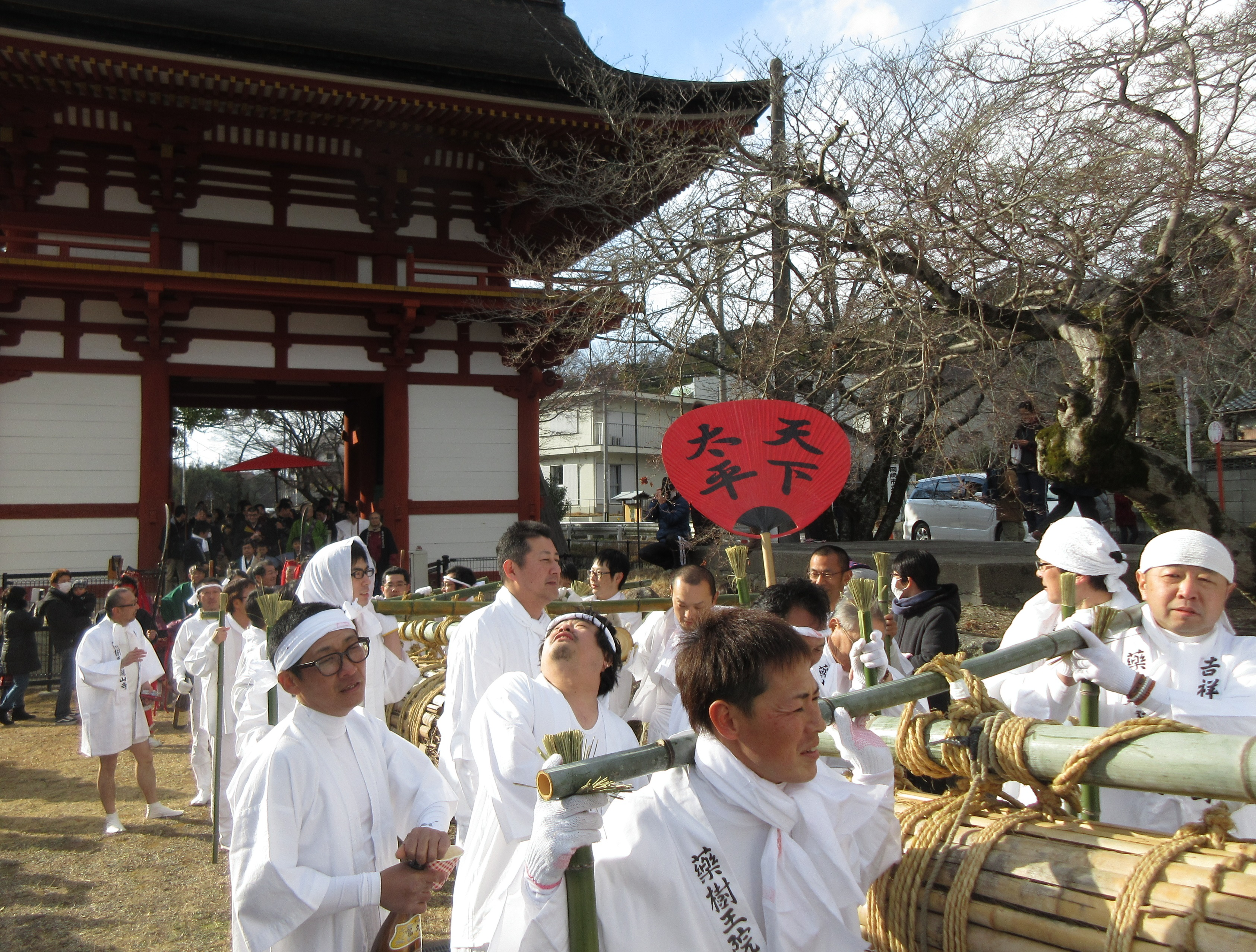 滝山寺鬼まつり（岡崎市滝町）